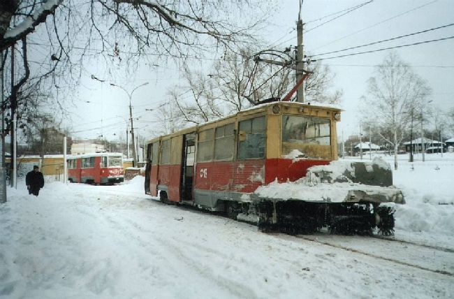 Вагон-снегоочиститель в службе пути в Разгуляе (2004 г.).